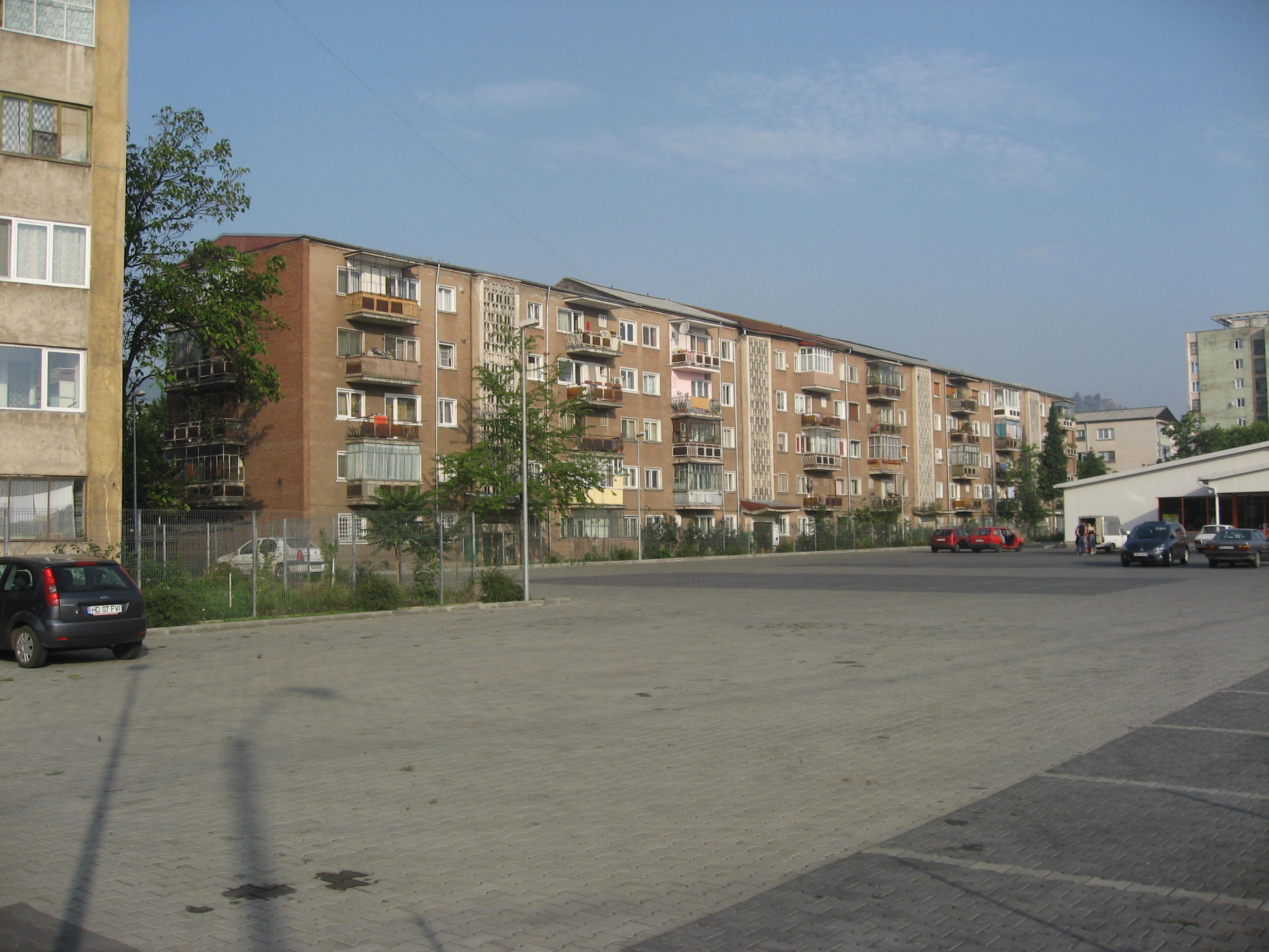 Deva, domy